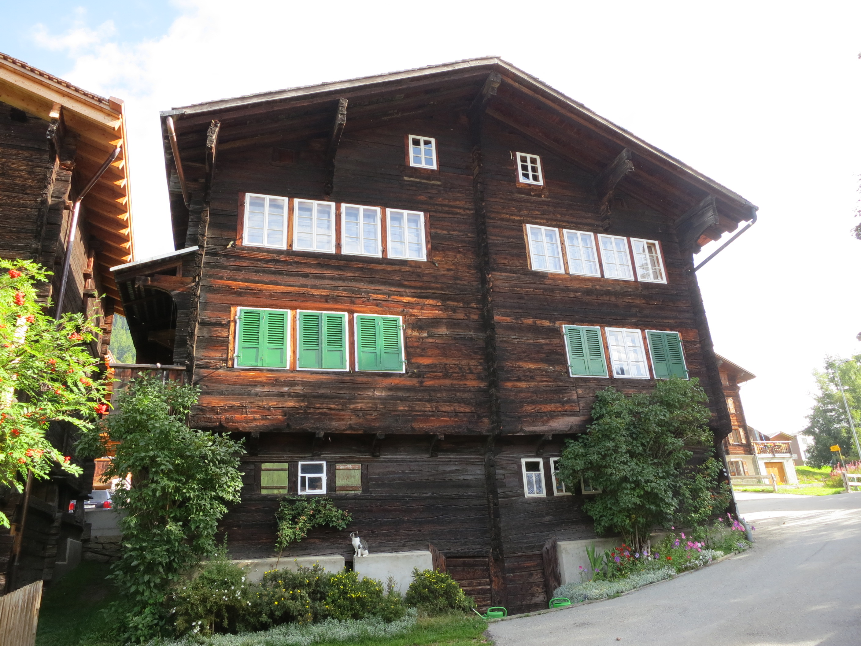 Wohnhaus, Reckingen VS, Schweiz